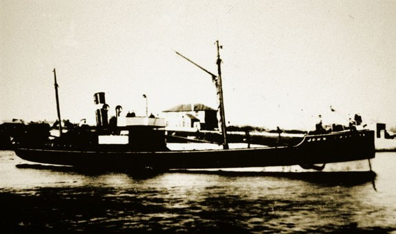 Пароход «Джон Графтон», вёзший в августе 1905 г. оружие для питерских рабочих.